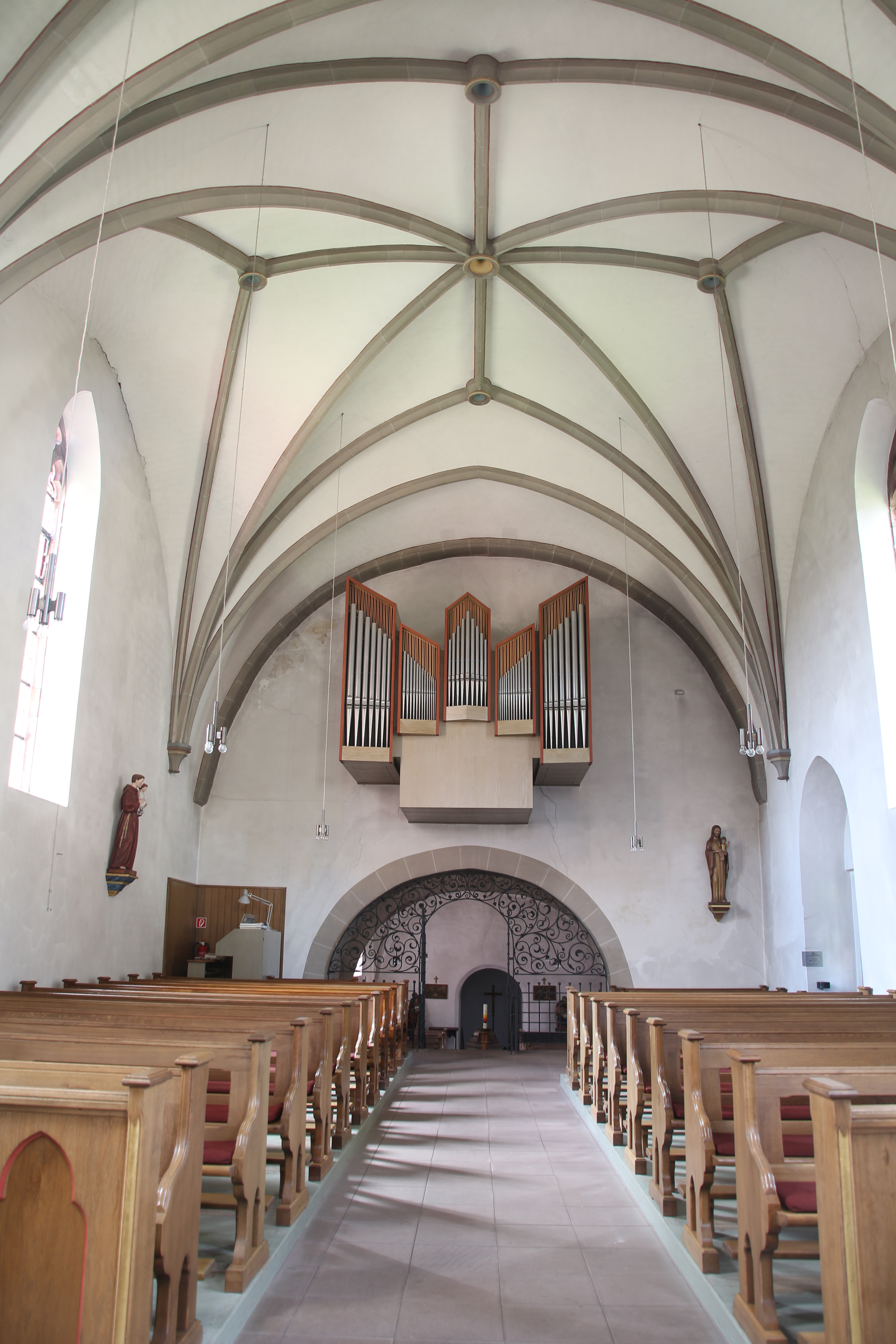 Blick vom Altar (Osten) auf die Nestorgel im gothischen Schiff. Unterhalb der Orgel hinter dem Gitter befindet sich der romanische Teil der Kirche der einige Meter tiefer liegt